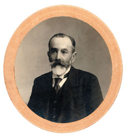 Retrato del poeta Augusto Winter